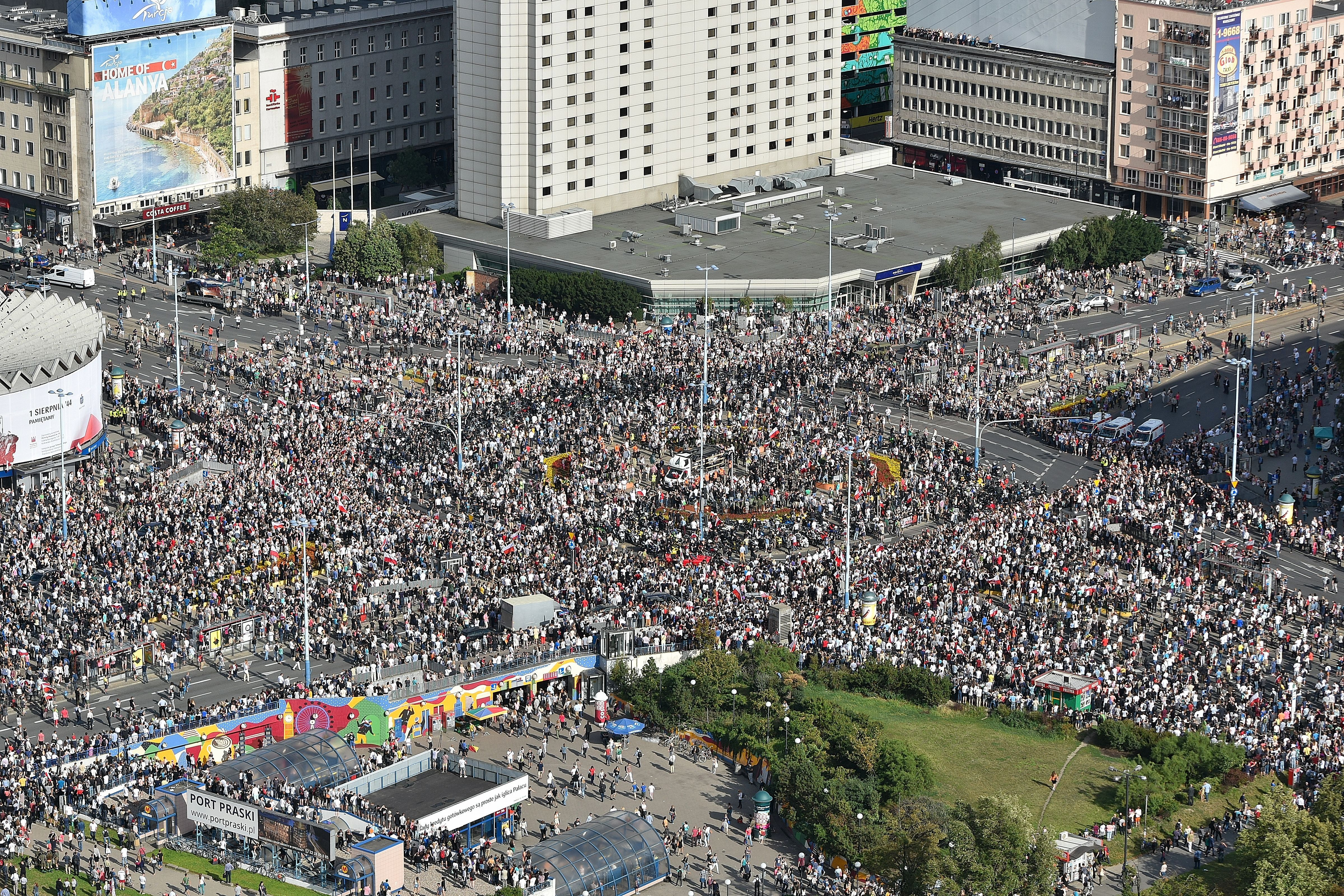 Upamiętnienie godziny "W" na rondzie Romana Dmowskiego w Warszawie